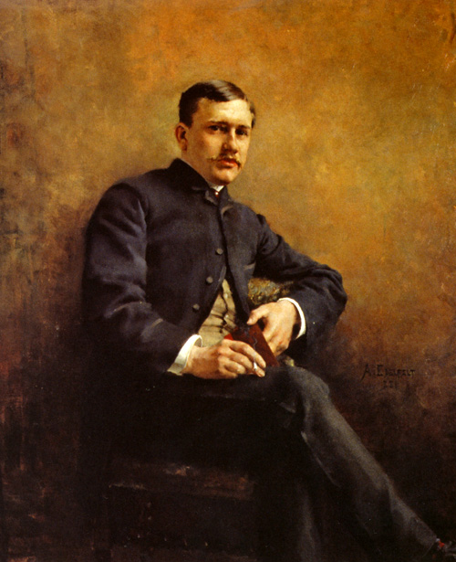 Jean Baptiste Pasteur. Porträtt av Albert Edelfelt.